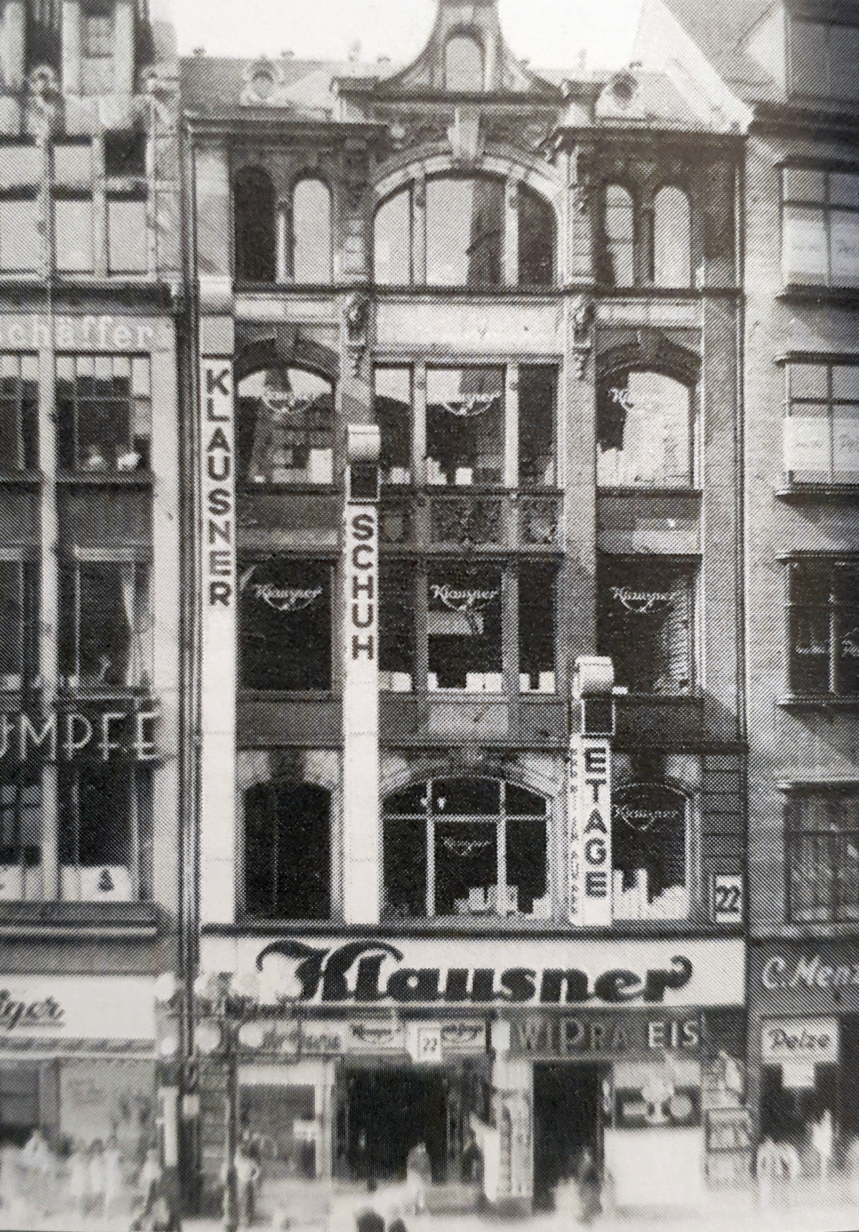 Kamienic nr 22 na wrocławskim Rynku, lata 20. XX wieku